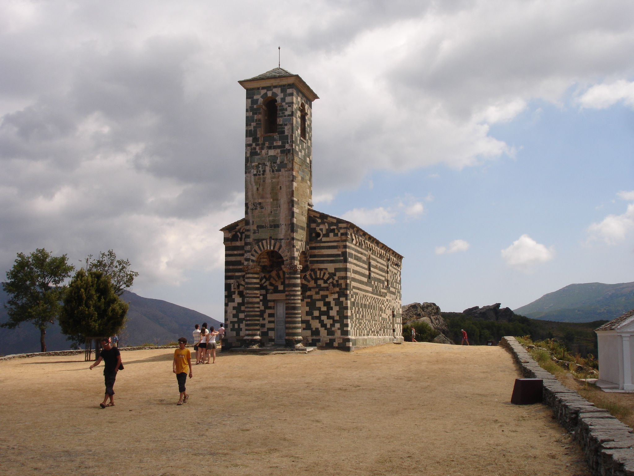 France, Haute-Corse (2B), église San Michele de Murato